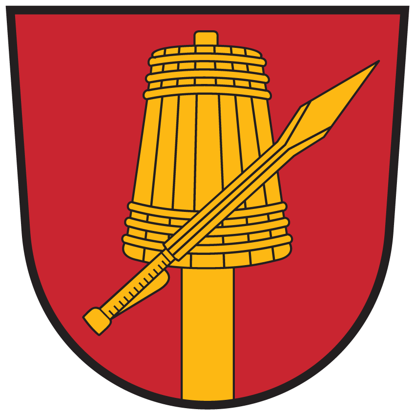 Wappen von Freistritz an der Gail